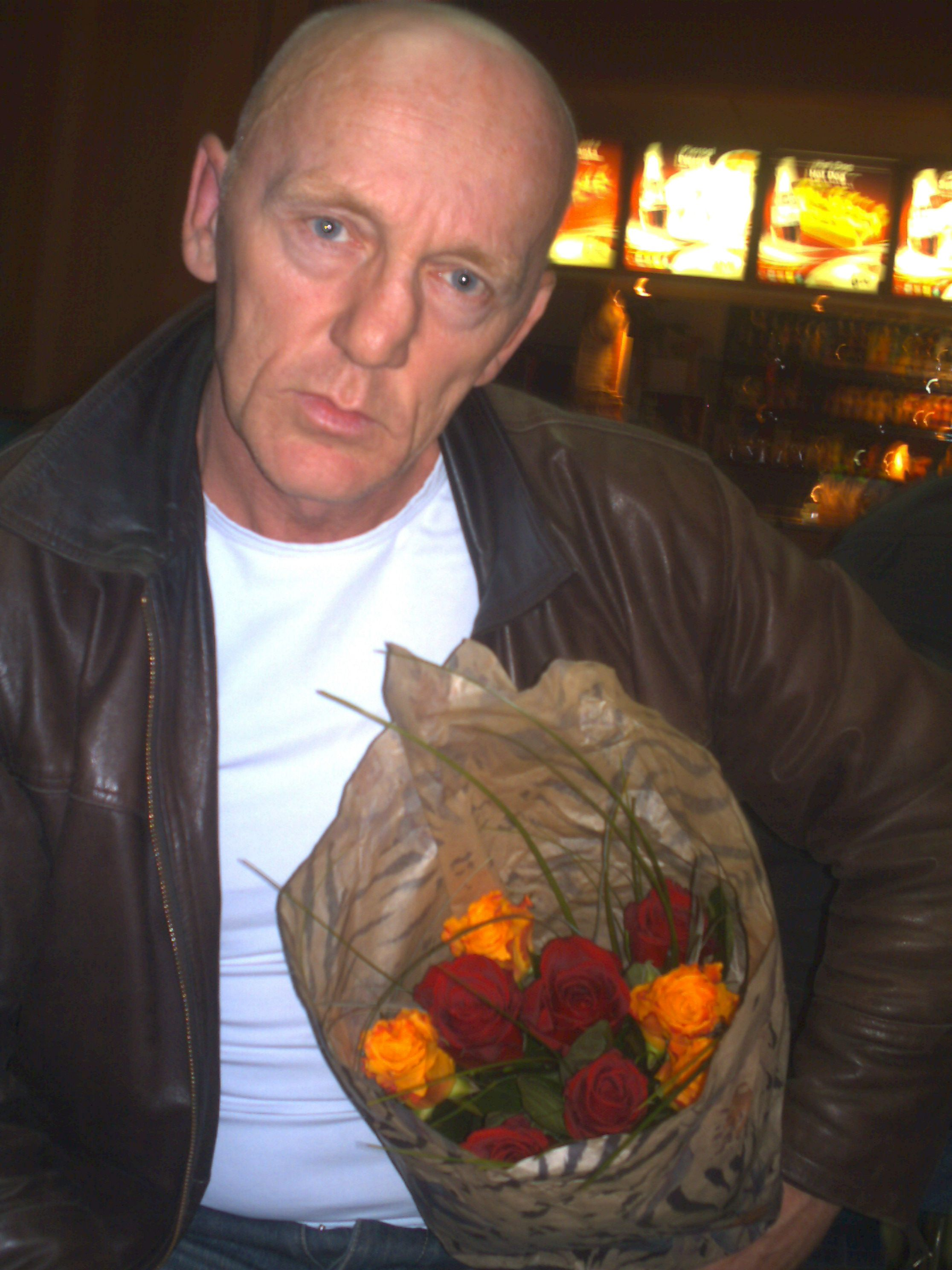 portret